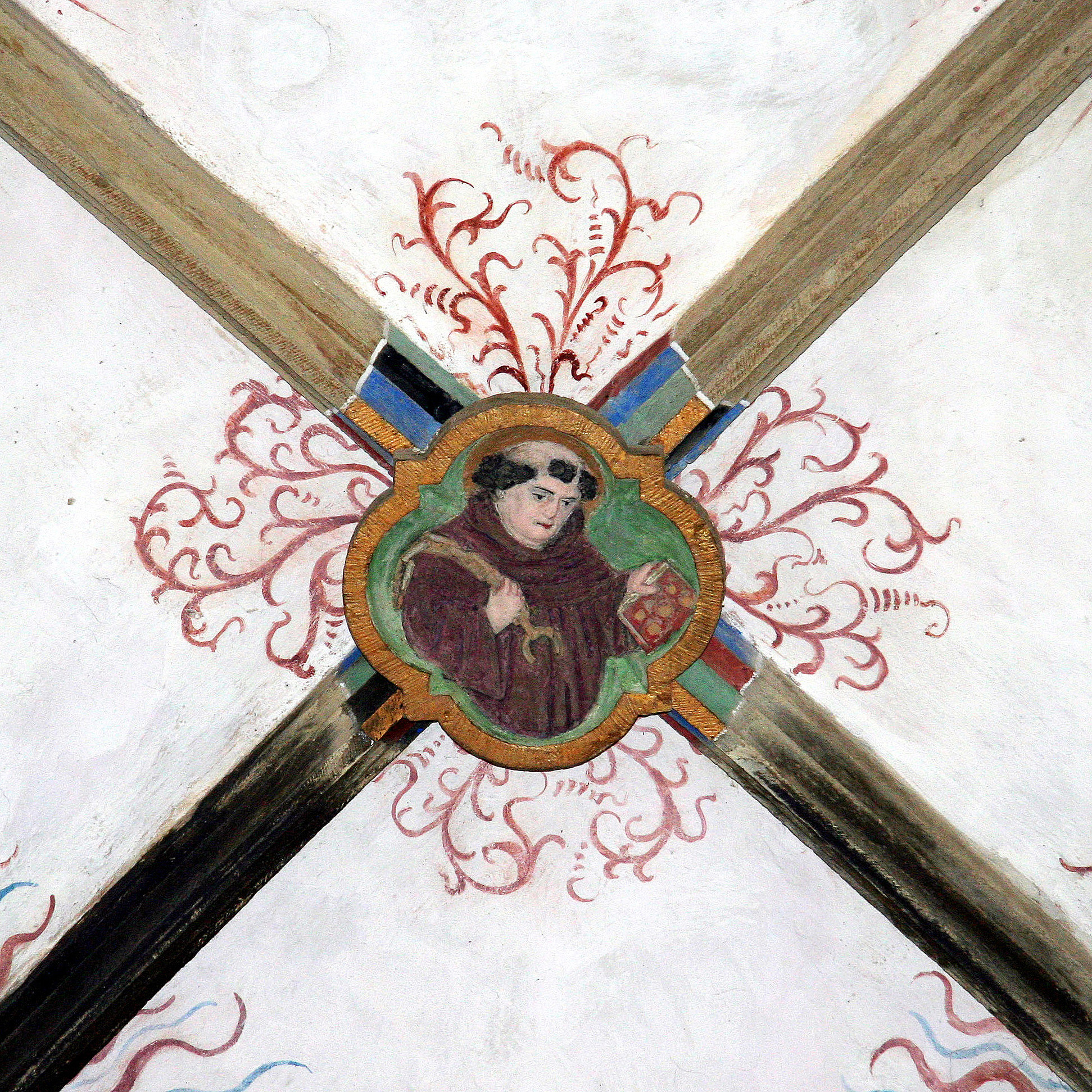 Deckengewölbe der Liebfrauenkirche in Lienzingen (Mühlacker) - Schlussstein Mönch - Franziskanermönch mit Bettelsack auf der Schulter